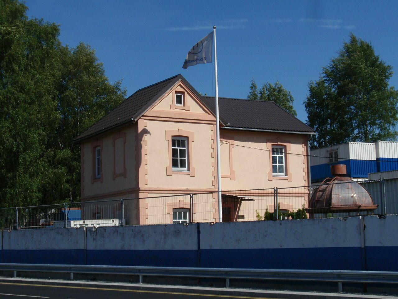 Veski post (Lutheri post) Tallinnas Tehnika tänava pikenduse ääres.